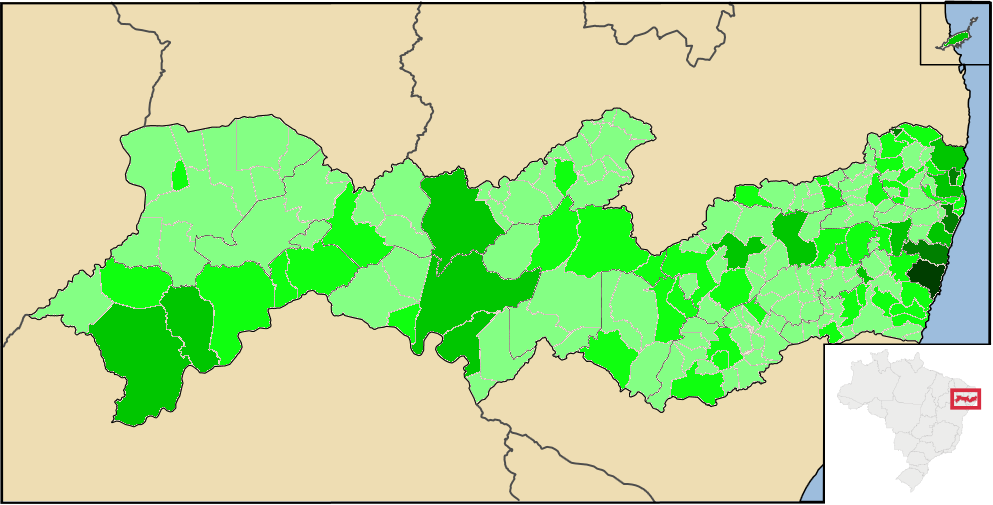 Mapa de Pernambuco por PIB per capita